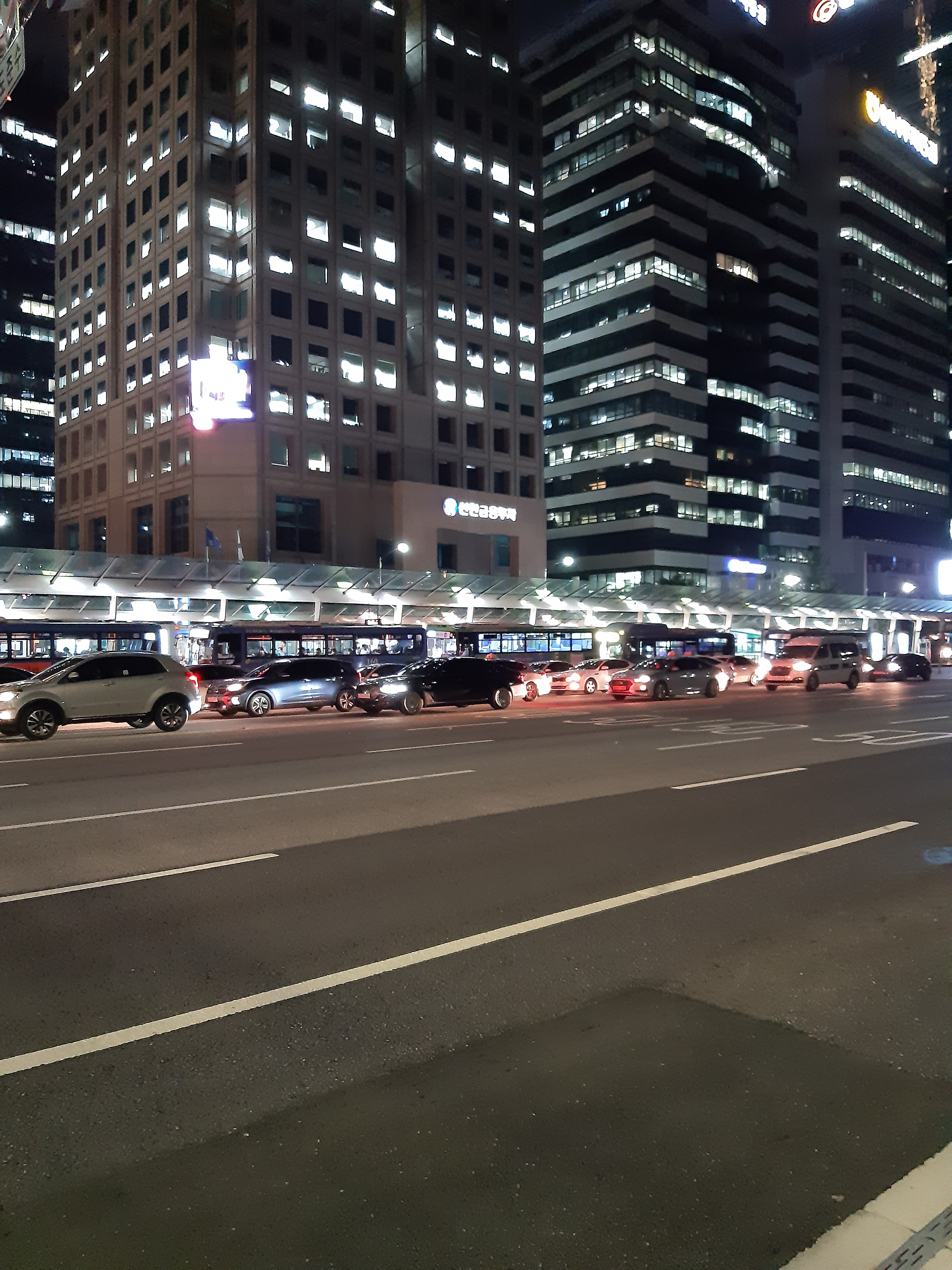 경인로(여의도환승센터) 46번국도